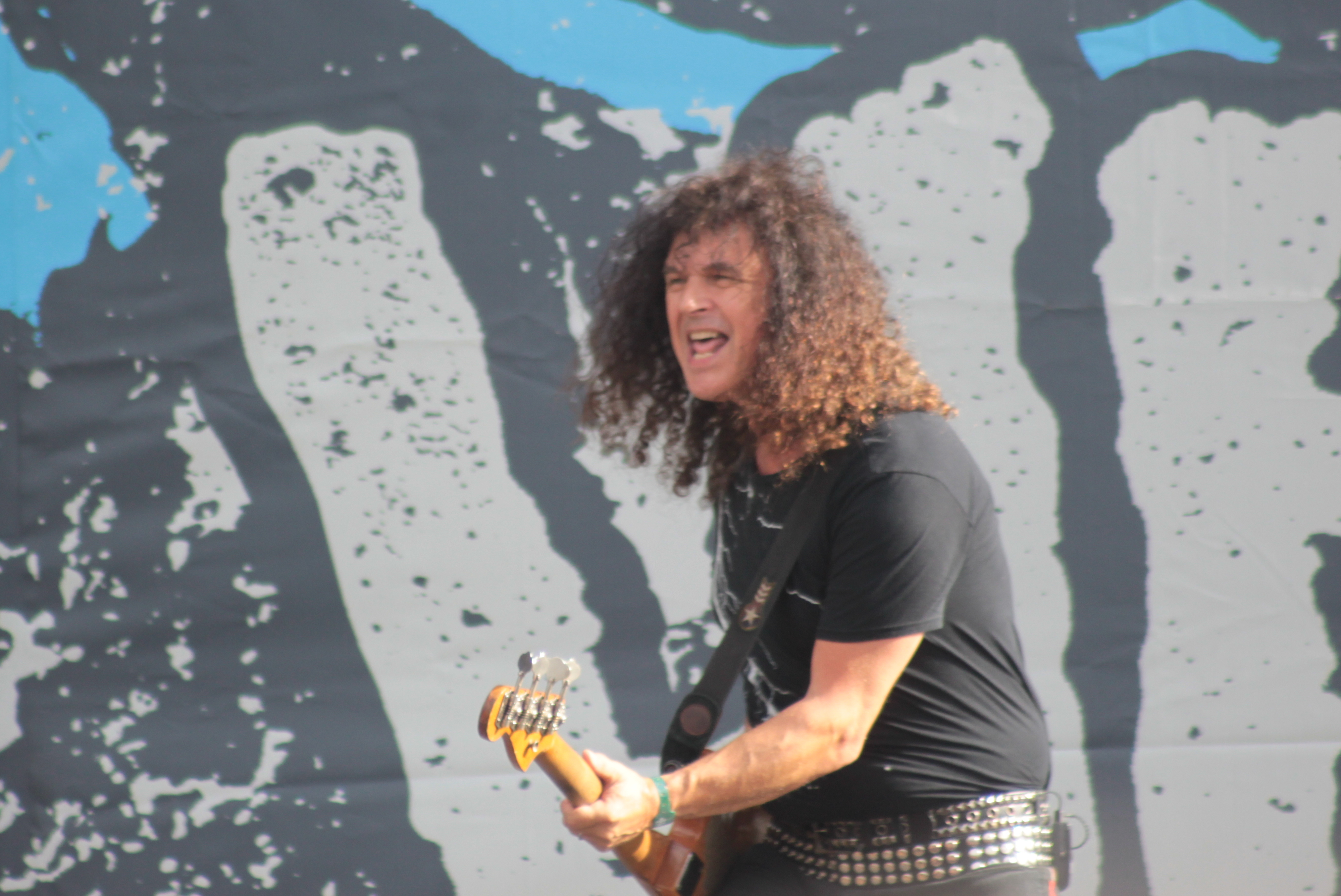 Peter Baltes, Accept, Helfest 2013, Fr-44-Clisson.